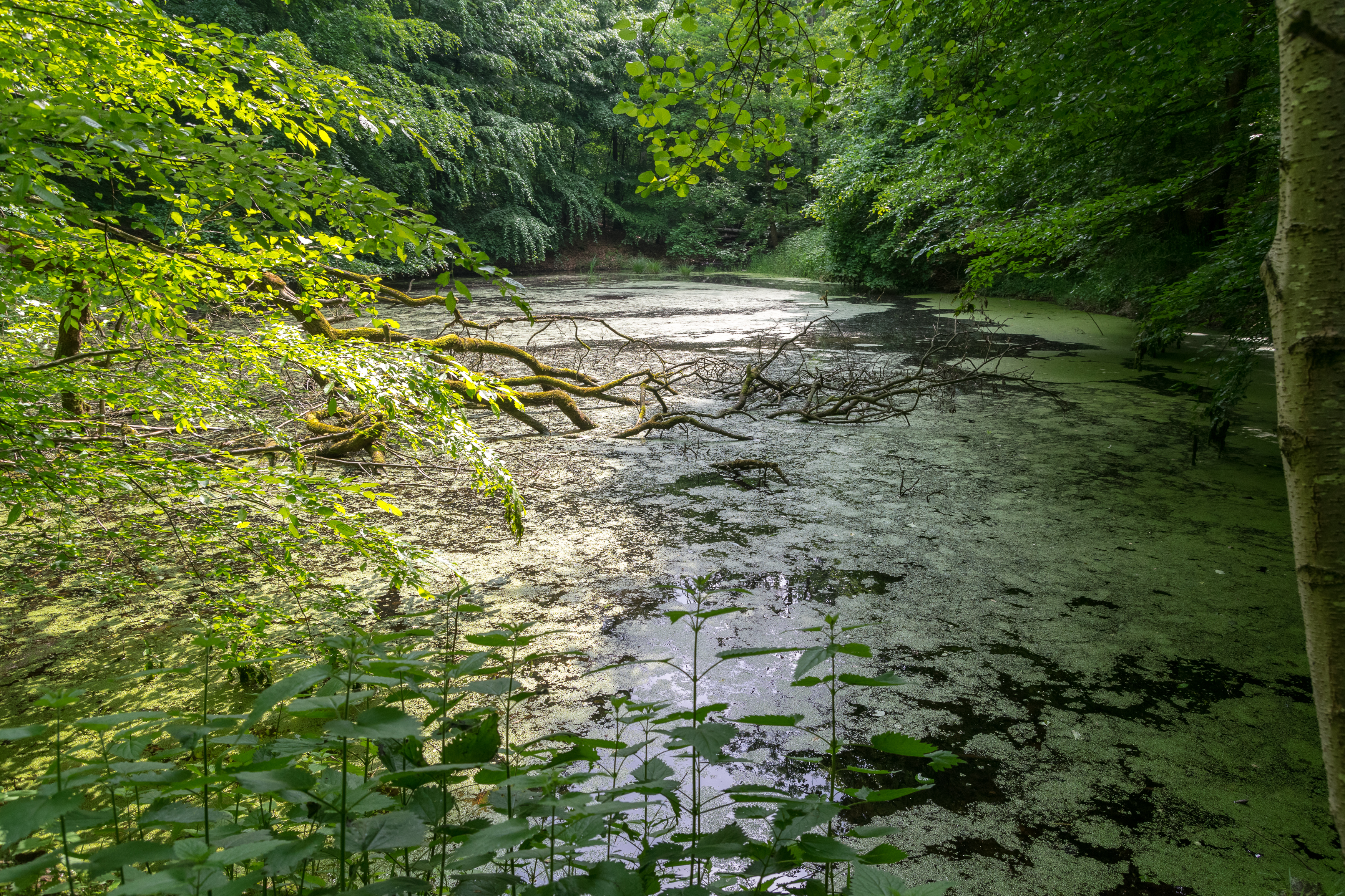 Kellerteiche im Naturschutzgebiet Stadtwald, Bad Salzuflen, Kreis Lippe